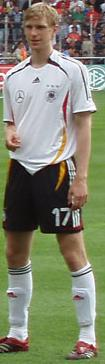 Per Mertesacker